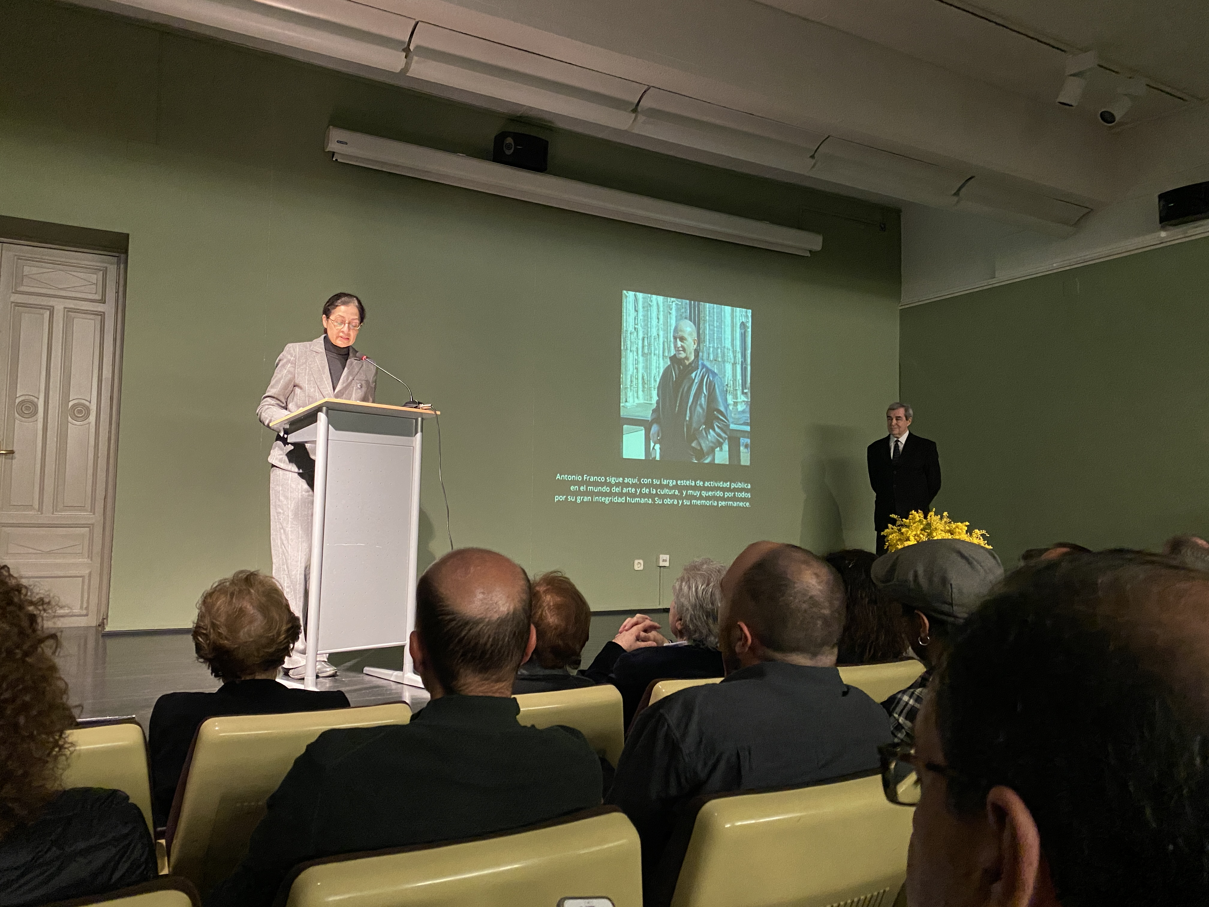 Homenaje presentado por el Doctor catedrático José Jimenez y ponentes Claudia Giannetti etc.